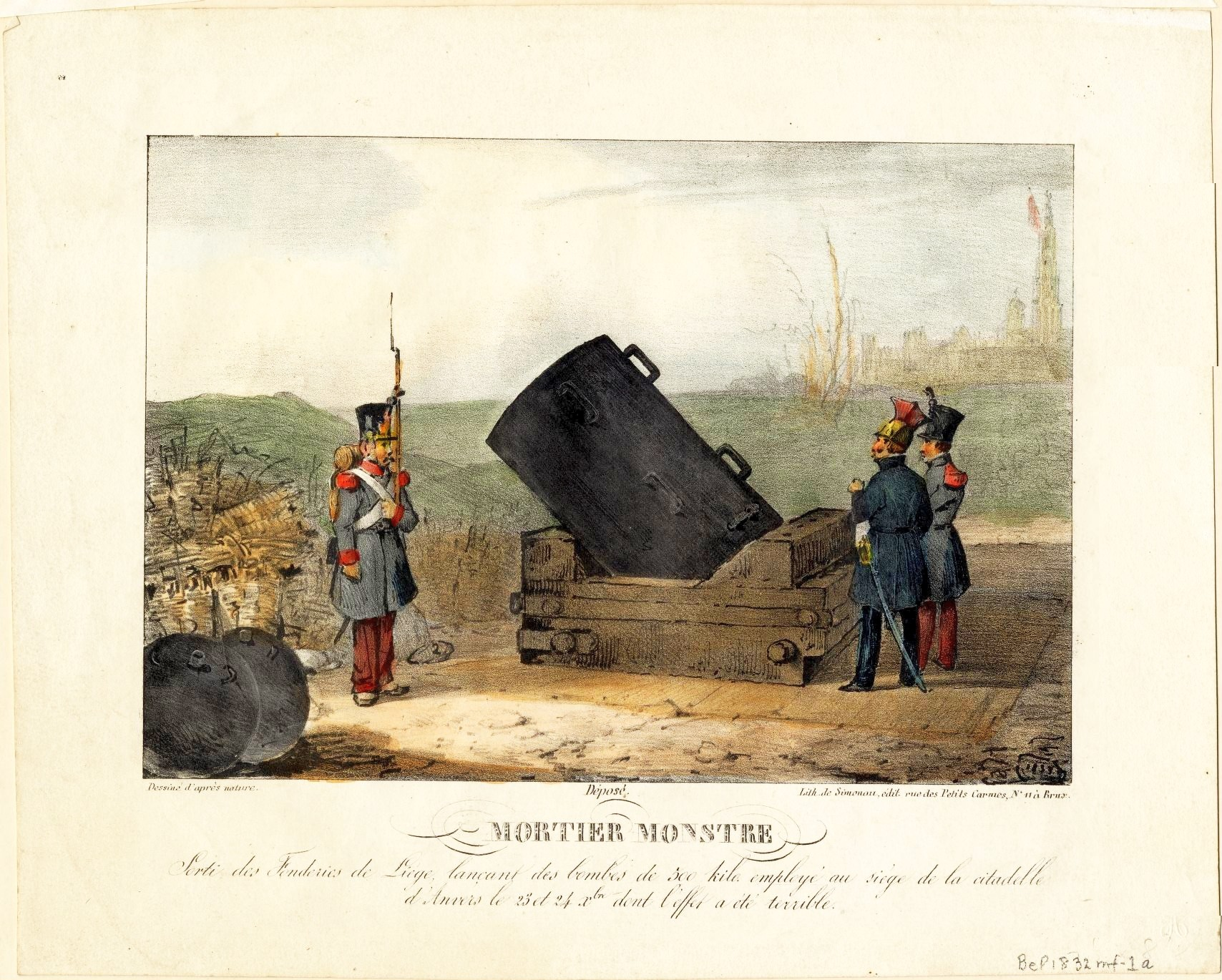 Mortier monstre sorti des fonderies de Liège employé au siège de la citadelle d'Anvers 1832 wiki